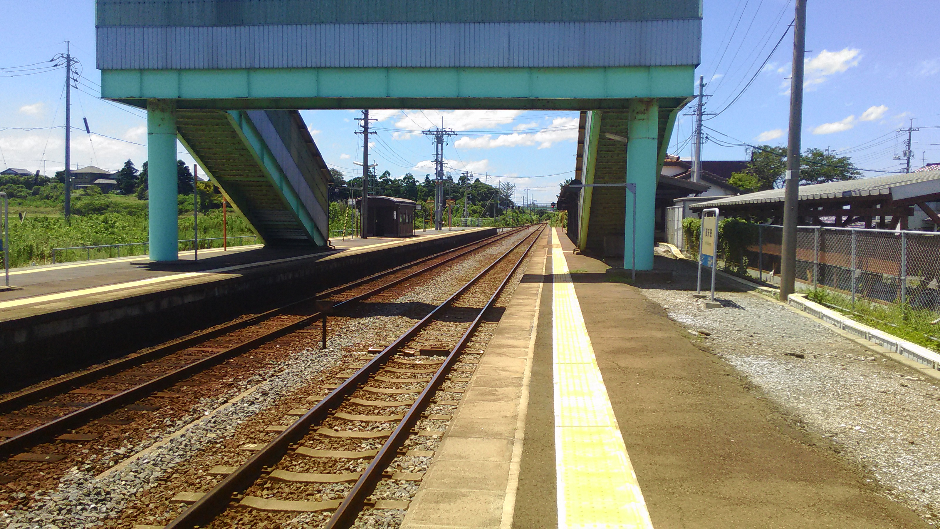 JR西日本山陰本線御来屋駅米子方面